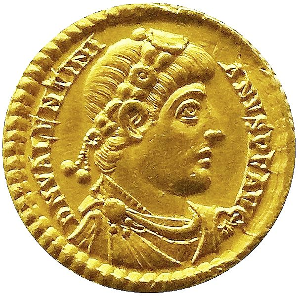 Solidus d'or de Valentinien Ier (364-375) atelier de Trèves - Musée d"archéologie nationale de Saint-Germain-en-Laye, Inv n° 1499 N